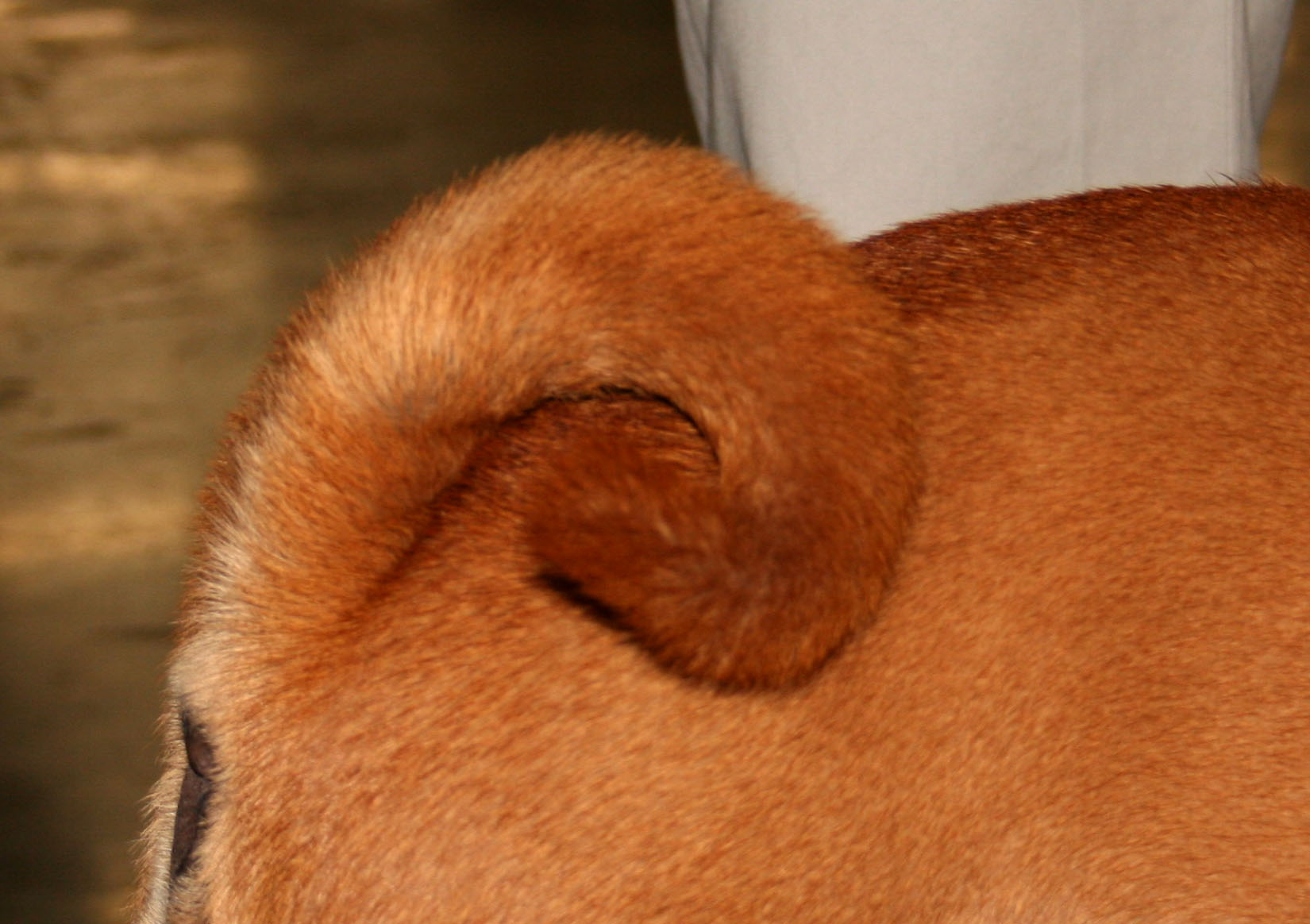 Sharpei na Światowej Wystawie Psów Rasowych w Poznaniu